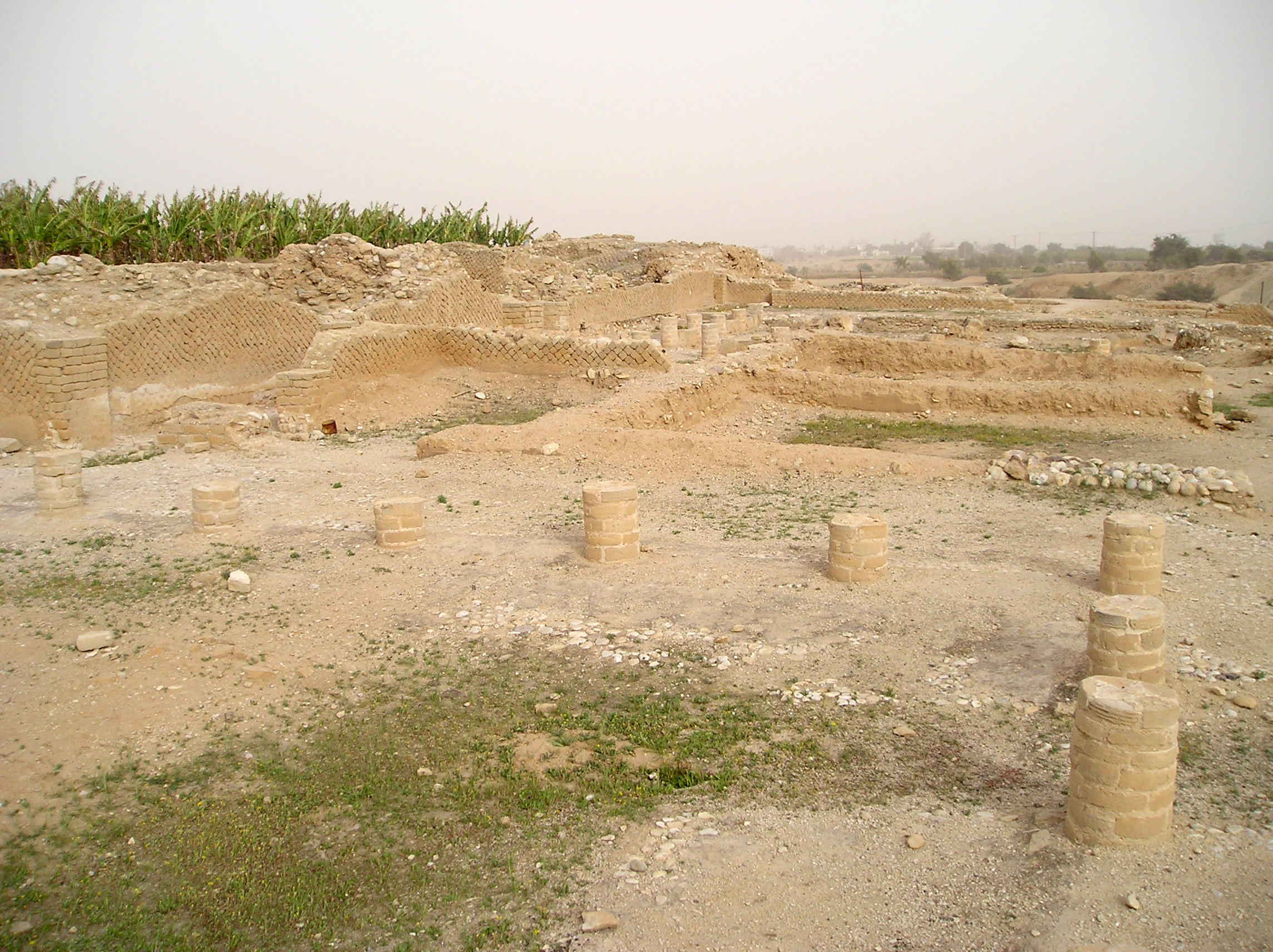 Tryklinium pałacu Heroda Wielkiego. Strefa wykopalisk na Tulul Abu el-Alayiq. Jerycho z czasów Hasmoneuszy i Heroda Wielkiego (od II w. przed Chr. do I w. po Chr.). Prace prowadzili: C. Warren - 1868, E. Sellin, C. Watzinger - 1909 e 1911, J. Kelso, D. Baramki, J. Pritchard - 1950-1951, G. Foerster e E. Netzer - 1973-1983 oraz 1986-1988. Badania trwają po dziś dzień. Zdjęcie wykonał A. Sobkowski dn. 9 marca 2006.